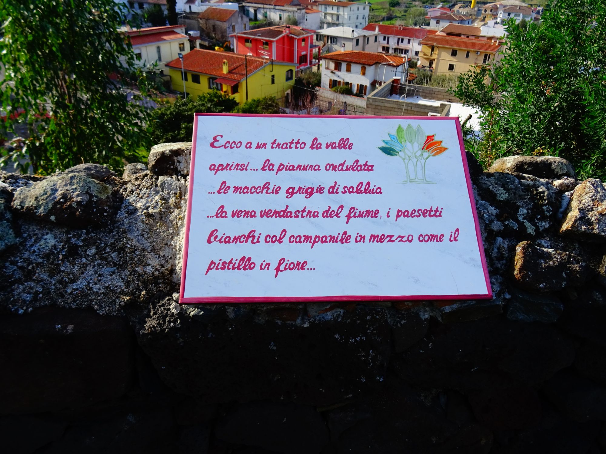 Belvedere di San Pietro a Galtellì. Particolare.